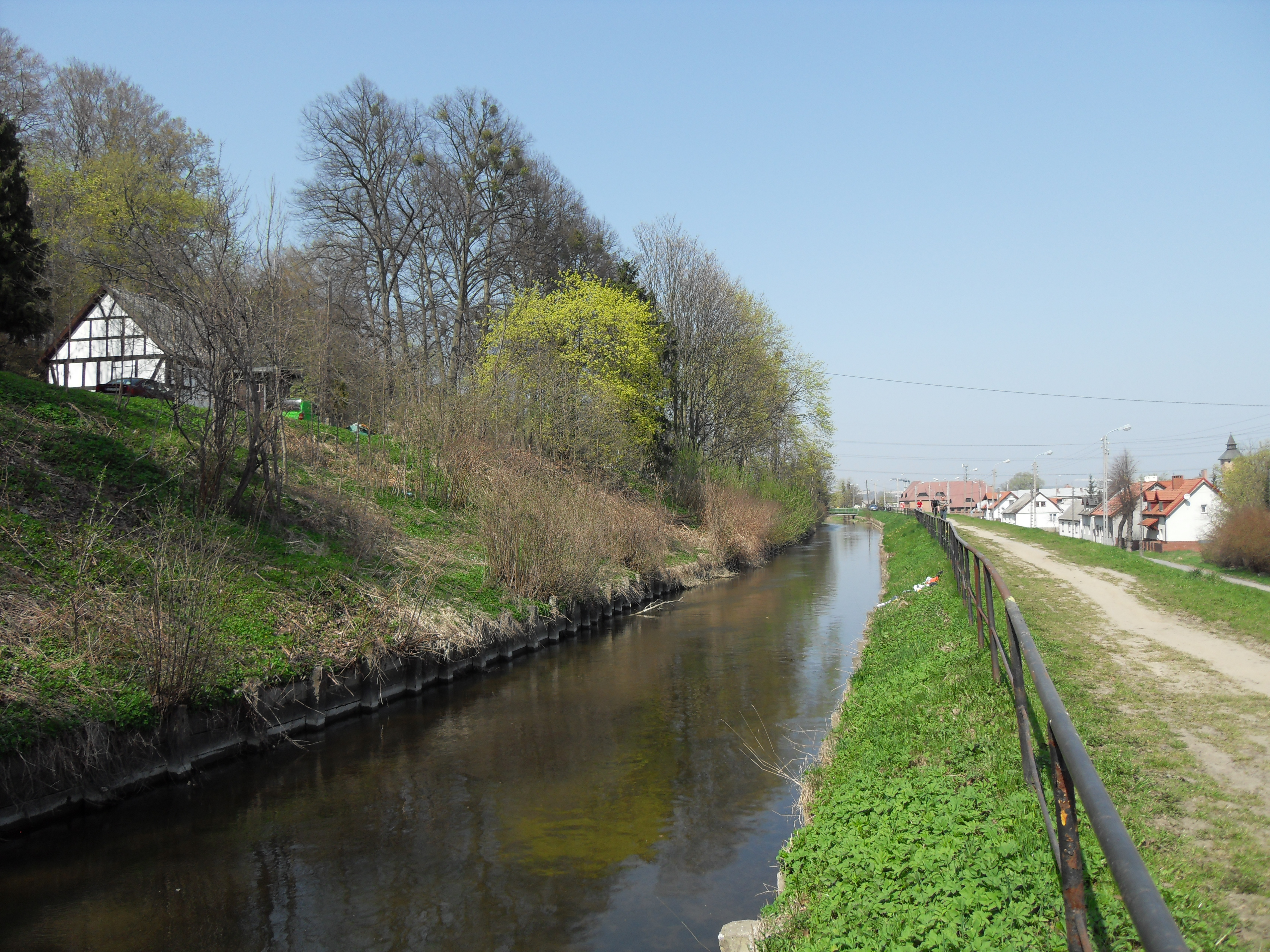 Gdańsk Święty Wojciech - kanał Raduni, widok w kierunku ujścia. Stan przed przebudową.